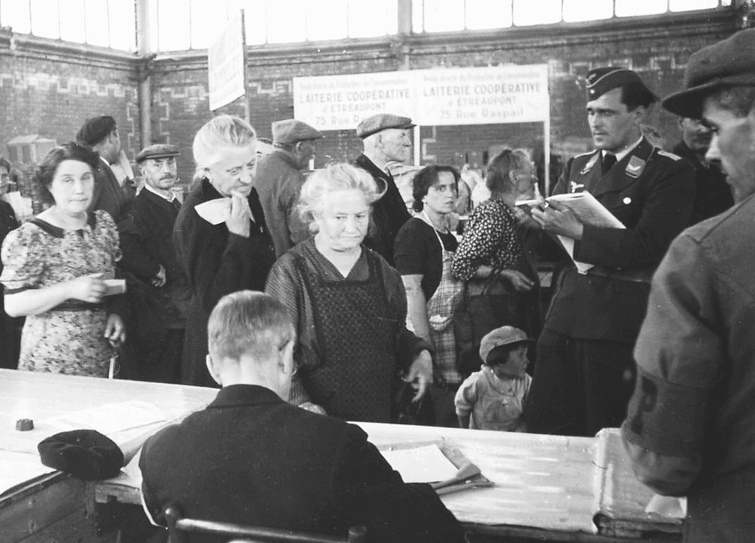 Helmuth Ellgaard, als Kriegsreporter in Frankreich 1940